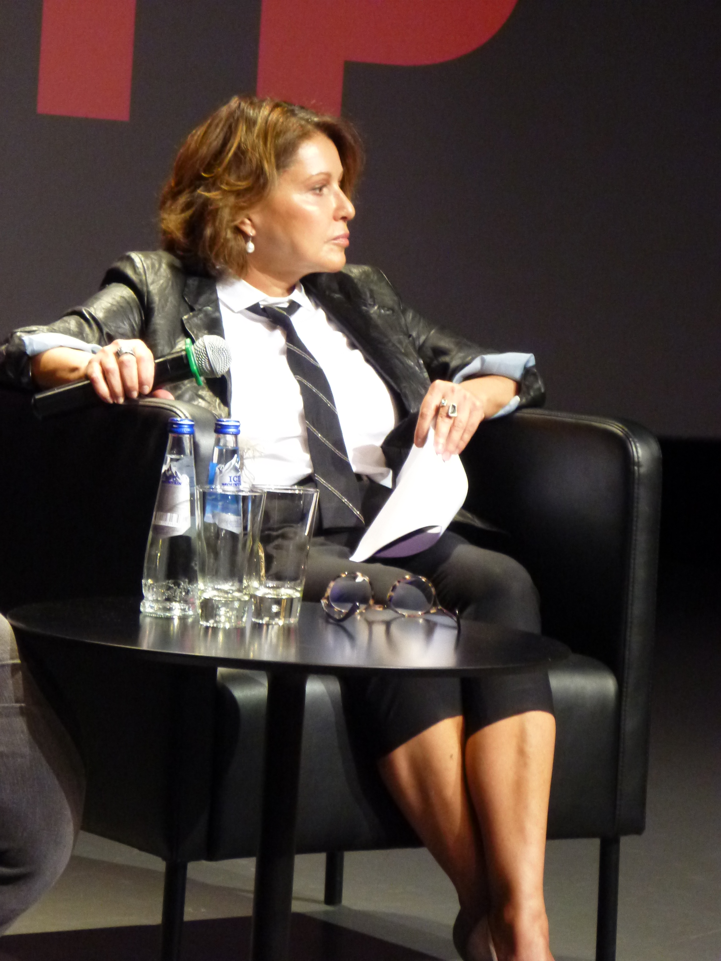 Наталья Негода без очков в Ельцин-центре 7 марта 2020 года